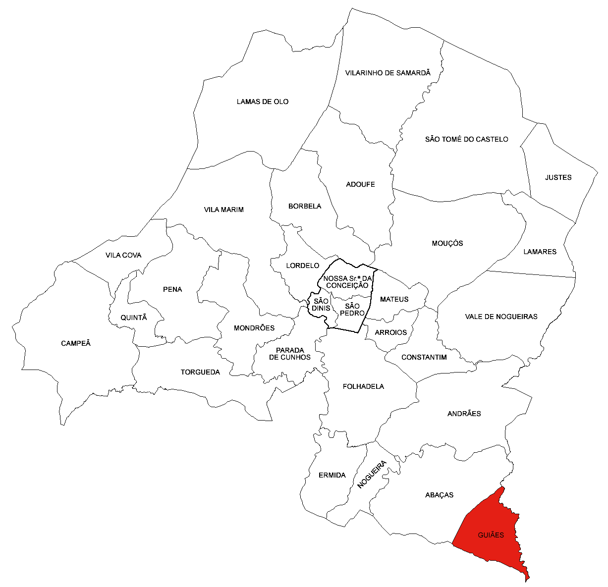 Freguesia de Guiães (concelho de Vila Real)